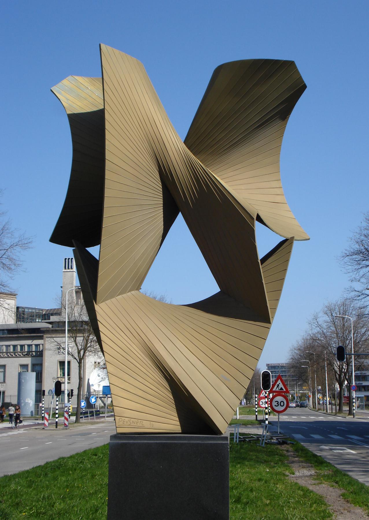 Den Haag, Johan de Wittlaan, Congresgebouw. Kunstwerk "Derde en vierde dimensie" van Antoine Pevsner. The Hague/The Netherlands.